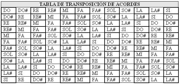 Tabla para transponer notas o acordes musicales